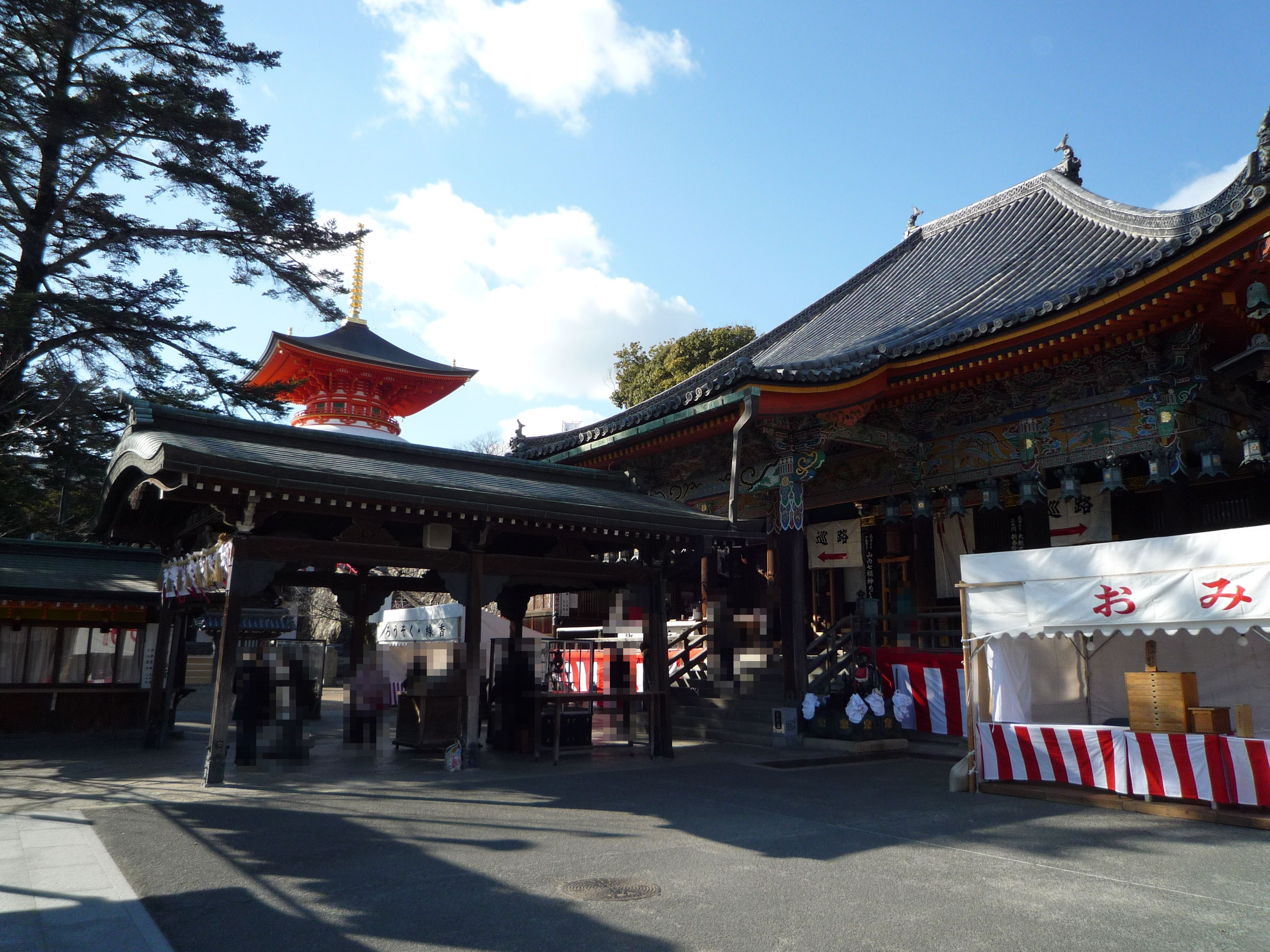 兵庫県宝塚市 中山寺本堂